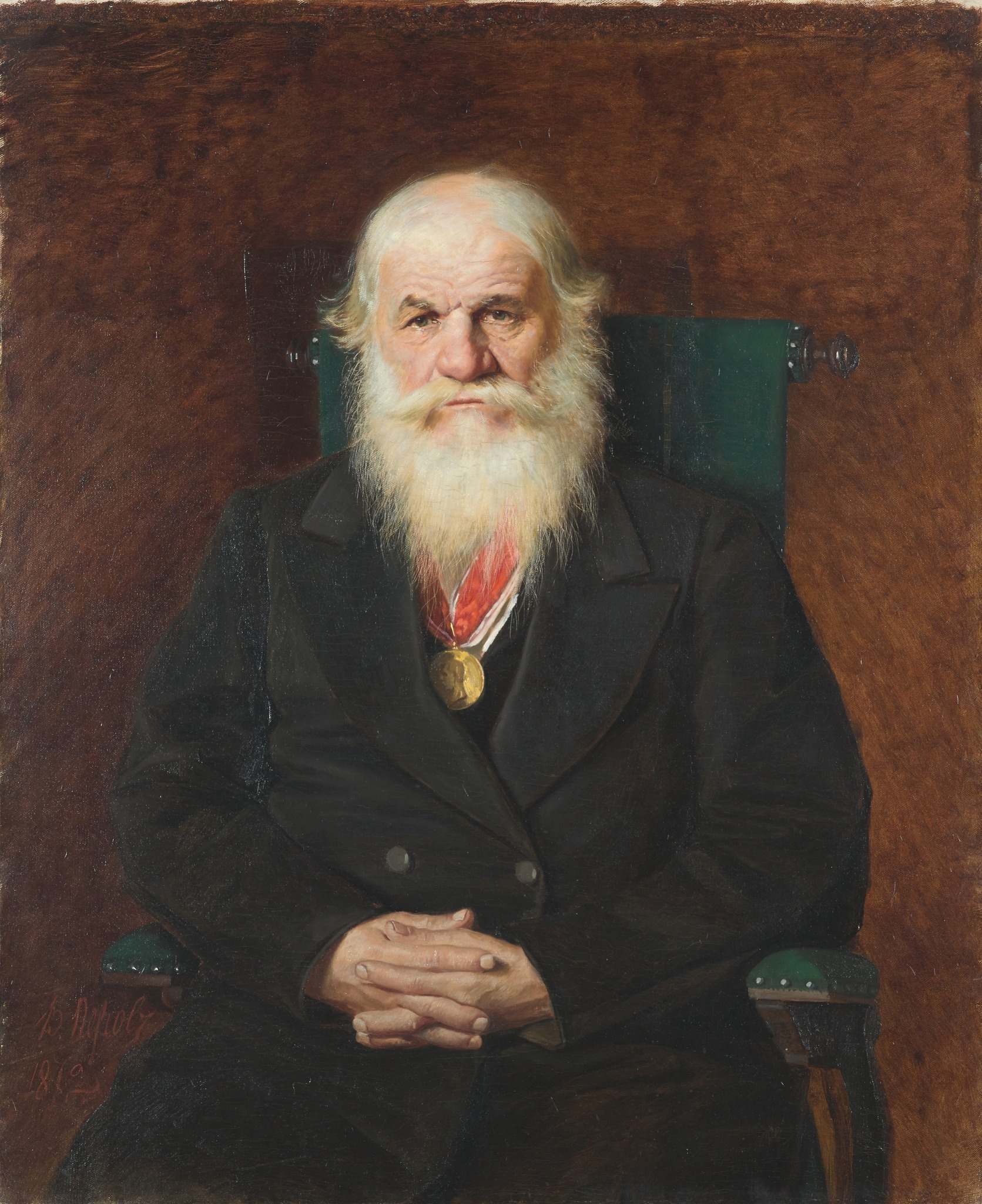 Портрет И.С. Камынина